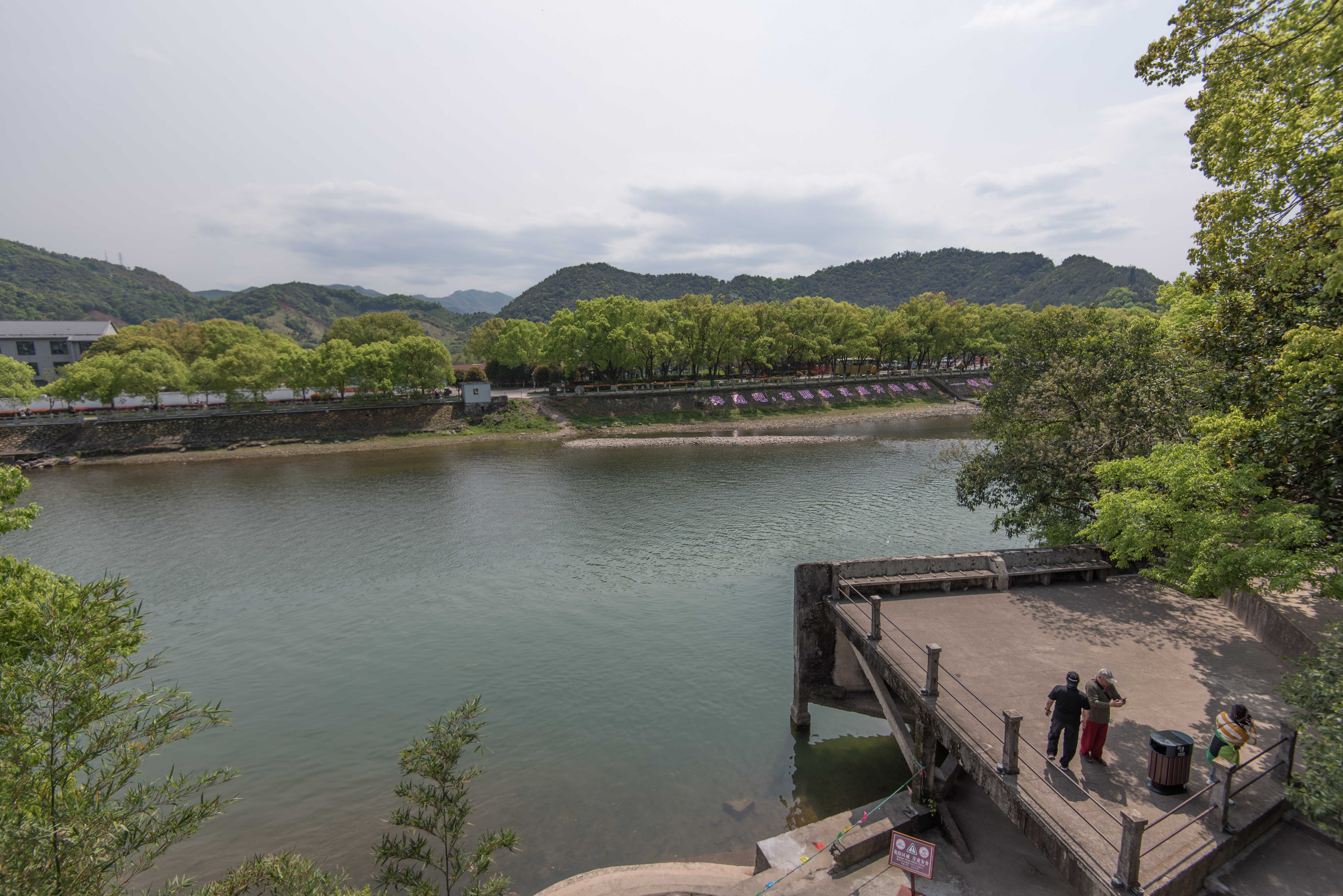 奉化溪口小洋房